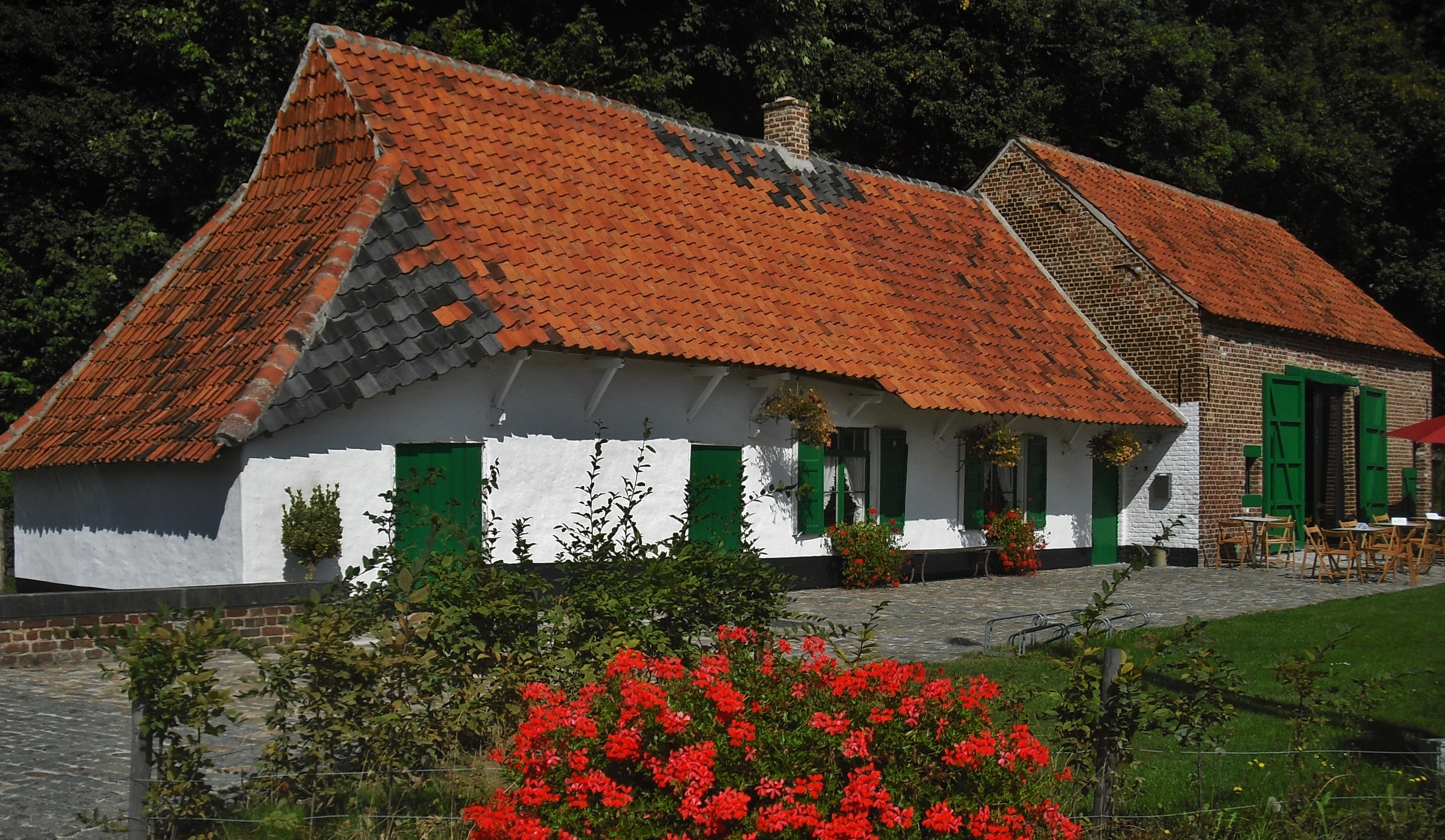 Gerestaureerd lemen hoevetje zoals er ooit vele stonden in het Pajottenland (tot ver in de 19-de eeuw). Nu kan men er kennis maken met de hopcultuur. Het staat op een idyllische plaats in het dorpscentrum van Sint-Martens-Bodegem (Dilbeek). This photo of immovable heritage has been taken in the Flemish Region